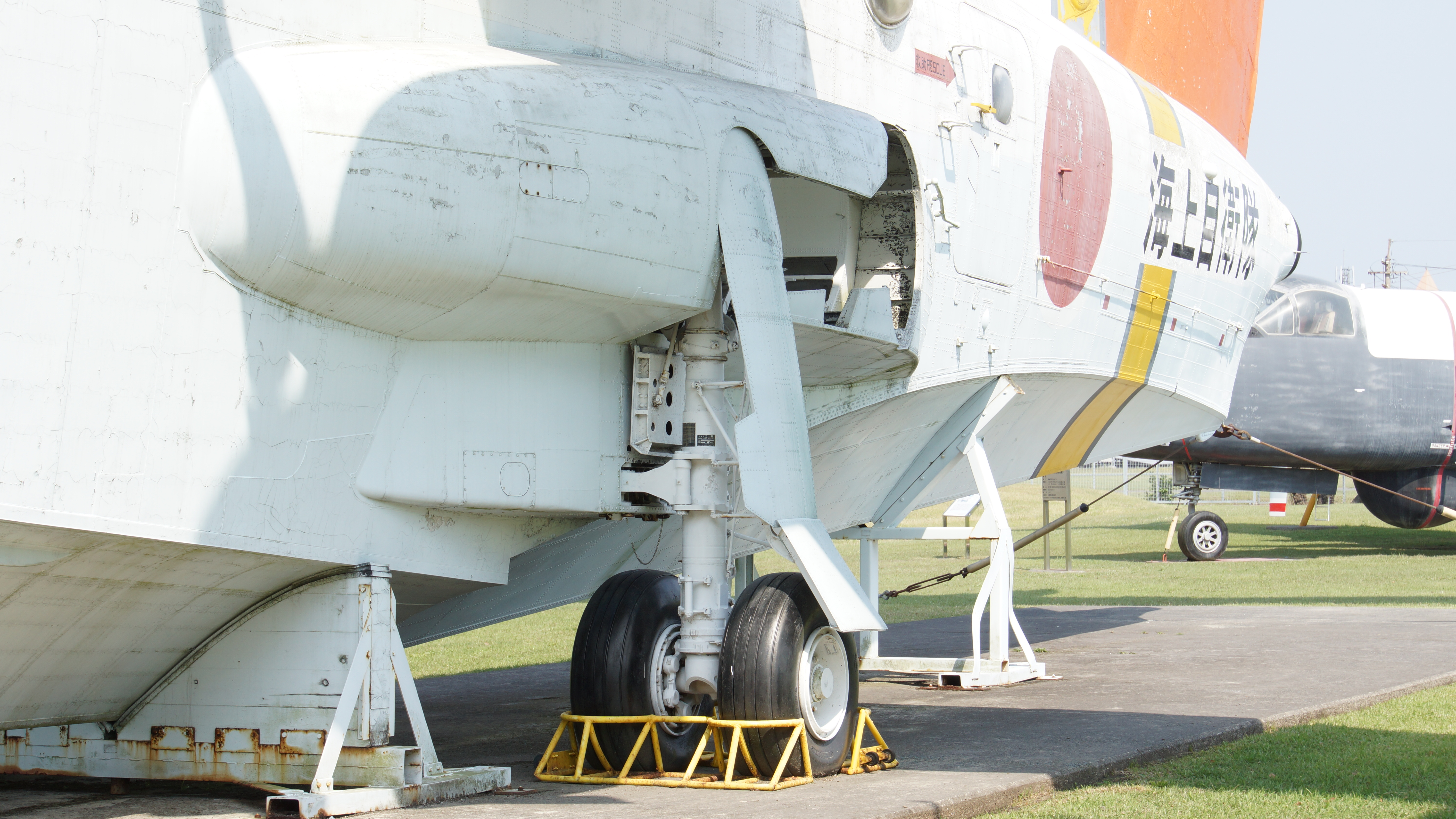 海上自衛隊 US-1A救難飛行艇（9076号機） 左主脚及びバルジ 左前面。2017年4月29日 鹿屋航空基地史料館にて。